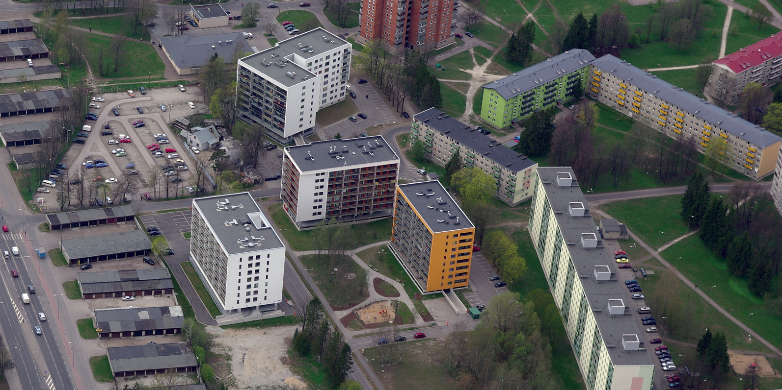 Õhuvaade Sipelga tänavale